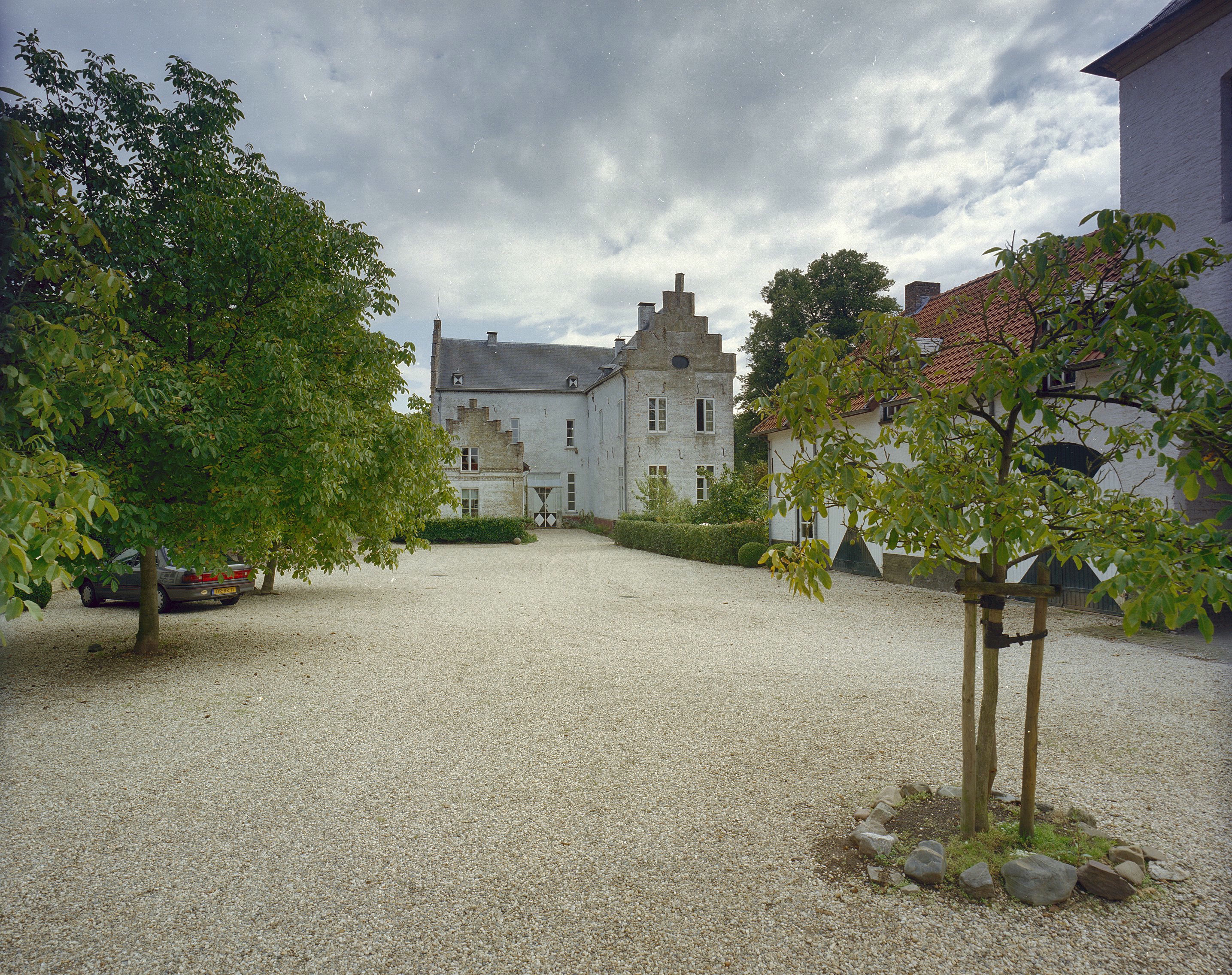 Kasteel Nieuwenbroeck: Overzicht van de binnenhof met zicht op het kasteel, rechts een gedeelte van de poortvleugel van de nederhof (opmerking: Gefotografeerd voor Kastelen in Limburg (1000-1800), Burchten en landhuizen)